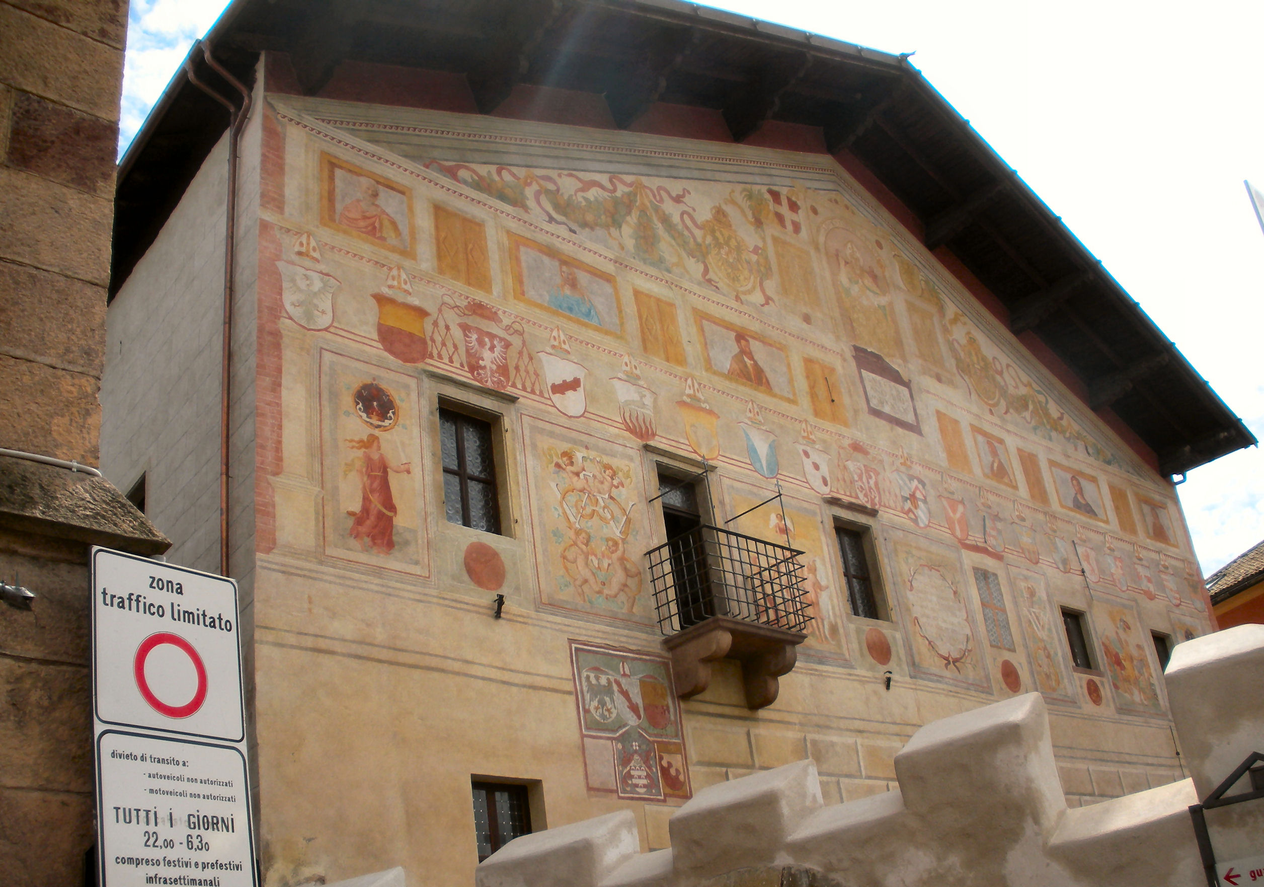 Cavalese (TN), il Palazzo della Magnifica Comunità di Fiemme Foto propria Luglio 2009